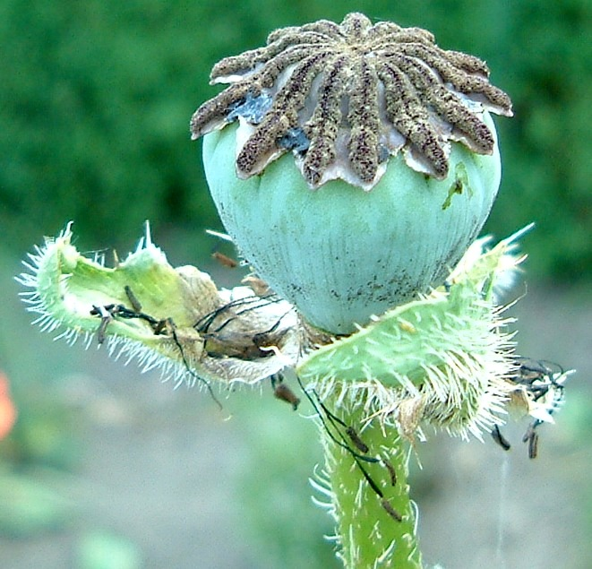 Staudenmohn Fruchtkapsel